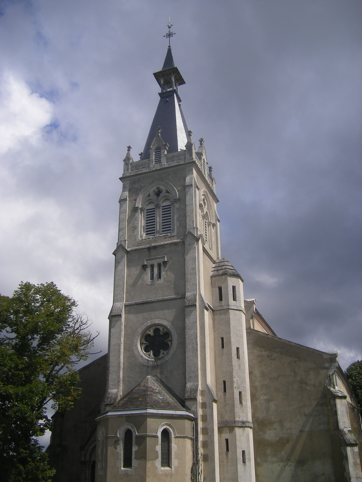 Saint-Julien-en-Born